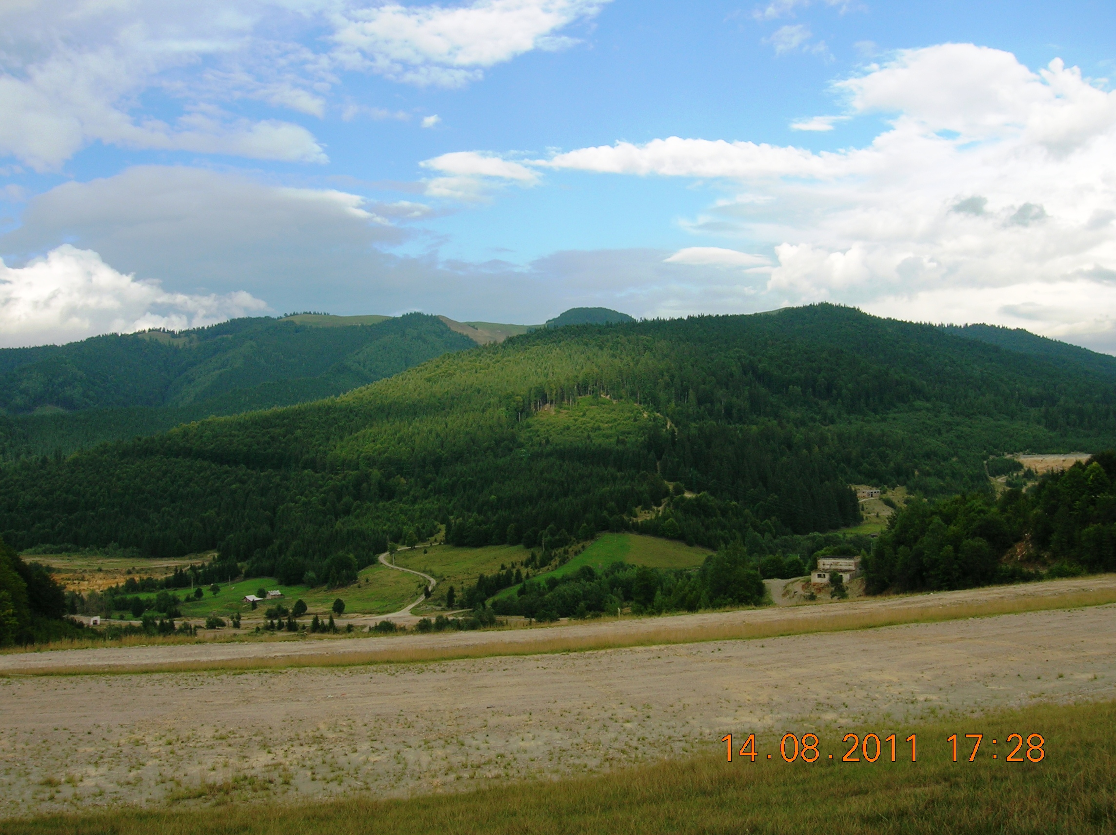 Munţii Stânişoarei (Carpaţii Orientali, România) - Partea de nord văzută de pe coronamentul Iazului Tărnicioara (Depresiunea Ostra) spre Est - Nord -Est. În zare golul alpin. La ora 15 se ghicește alt baraj